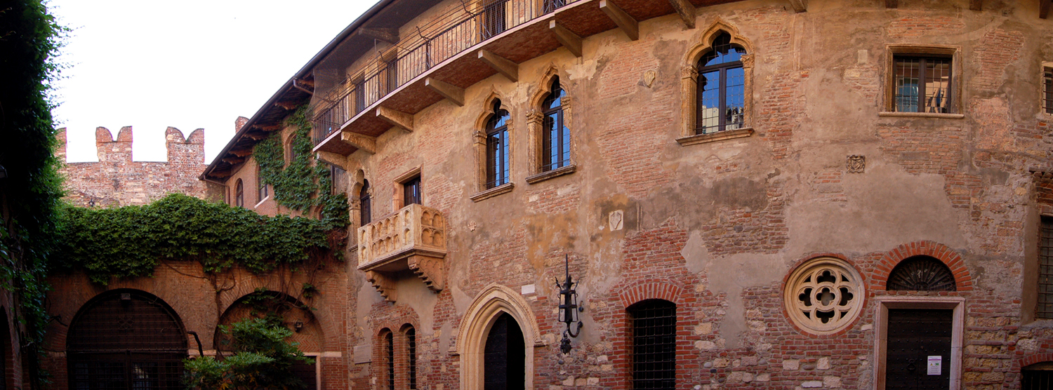 Fotografia della casa di Giulietta a Verona (in realtà palazzo dei Cappelletti, da cui Capuleti)